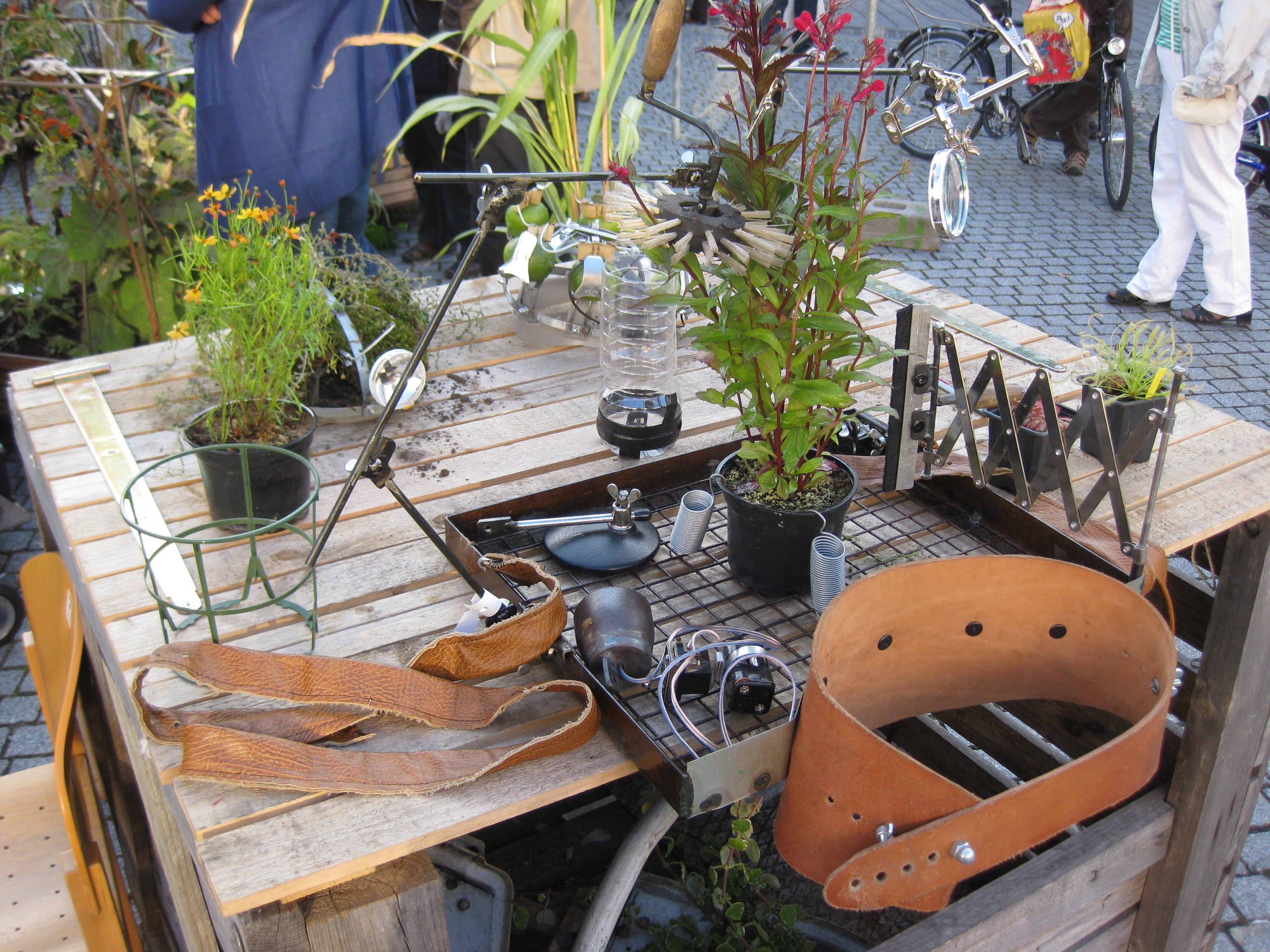 Öffentliches botanisches Labor zur Energiegewinnung